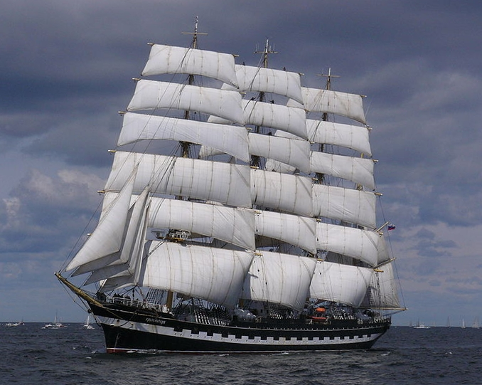 Крузенштерн